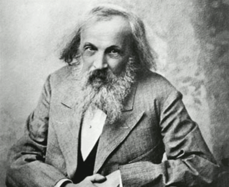 A portrait of Russian chemist Дмитрий Иванович Менделеев (Dmitri Ivanovich Mendeleyev), February 1834–2 Feb 1907.